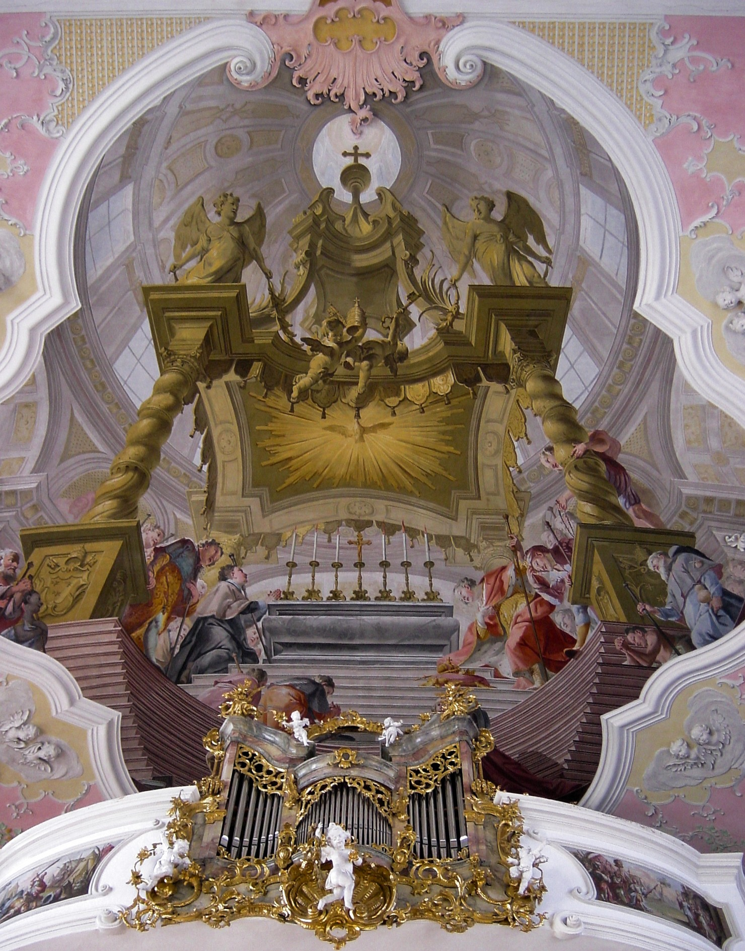 Oberammergau, Pfarrkirche St. Peter und Paul, Fresko über der Orgel (Baldachin im Petersdom Rom) Matthäus Günther (1705–1788) DescriptionGerman painterDate of birth/death7 September 170530 September 1788Location of birth/deathPeißenbergHaid bei WessobrunnAuthority control : Q463504 VIAF: 12576733 ISNI: 0000 0000 8092 1889 ULAN: 500009016 LCCN: n88108547 WGA: GÜNTHER, Matthäus WorldCat